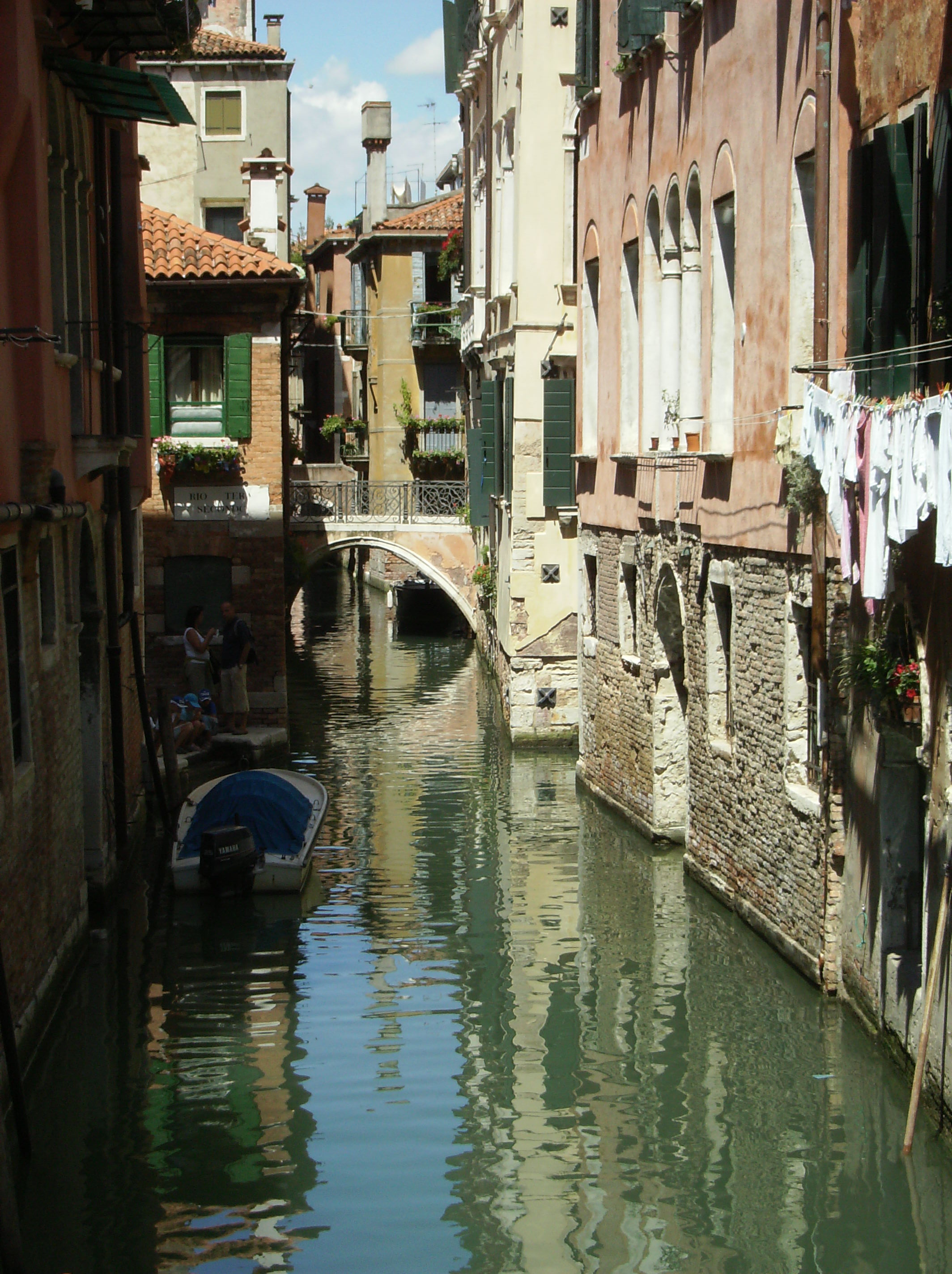 rio de ponte storto venise